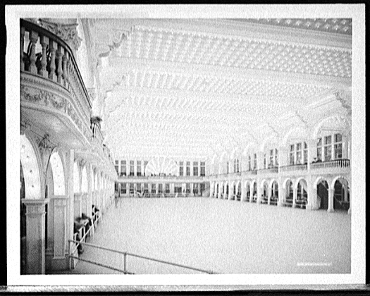 Ballsaal im Dreamland-Vergnügungspark auf Coney Island, New York.